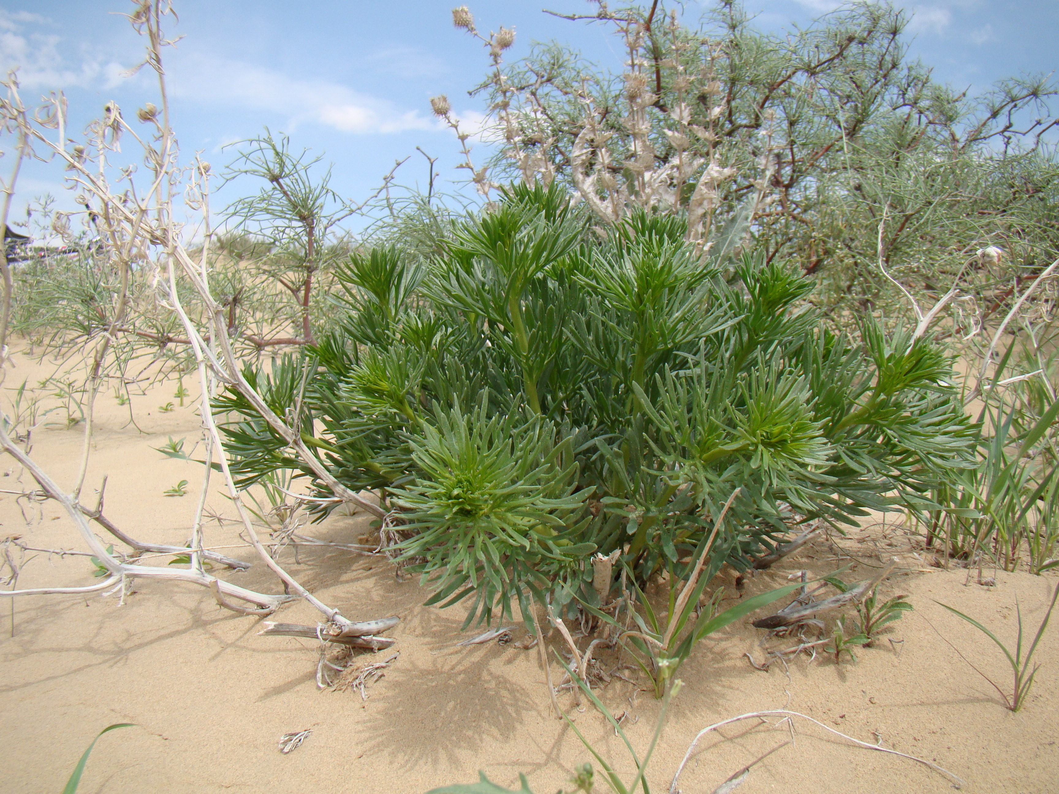 Гармала (Peganum harmala). Окрестости города Байконур, Казахстан